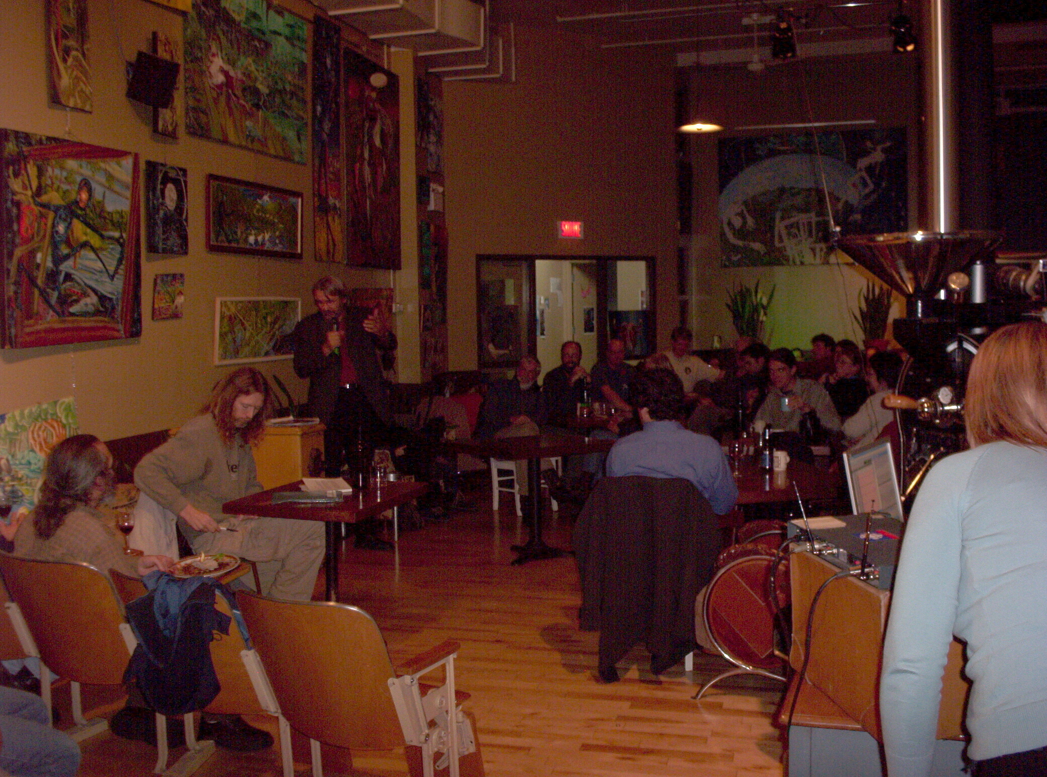 Café scientifique au Café Cambio de Chicoutimi, Québec. Animé par Yanick Villedieu.